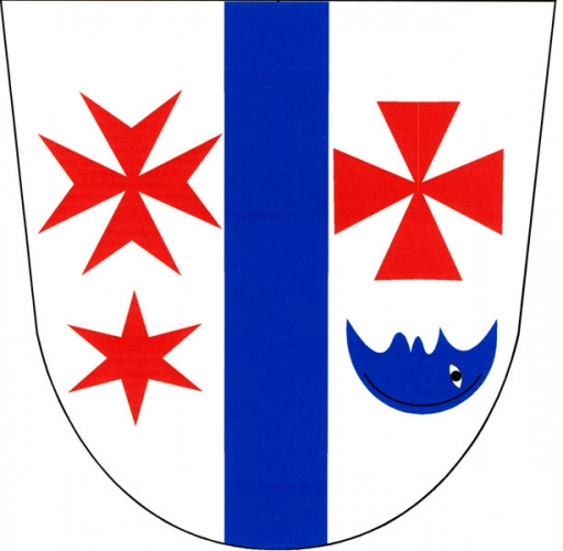 znak, Mašovice, okres Znojmo